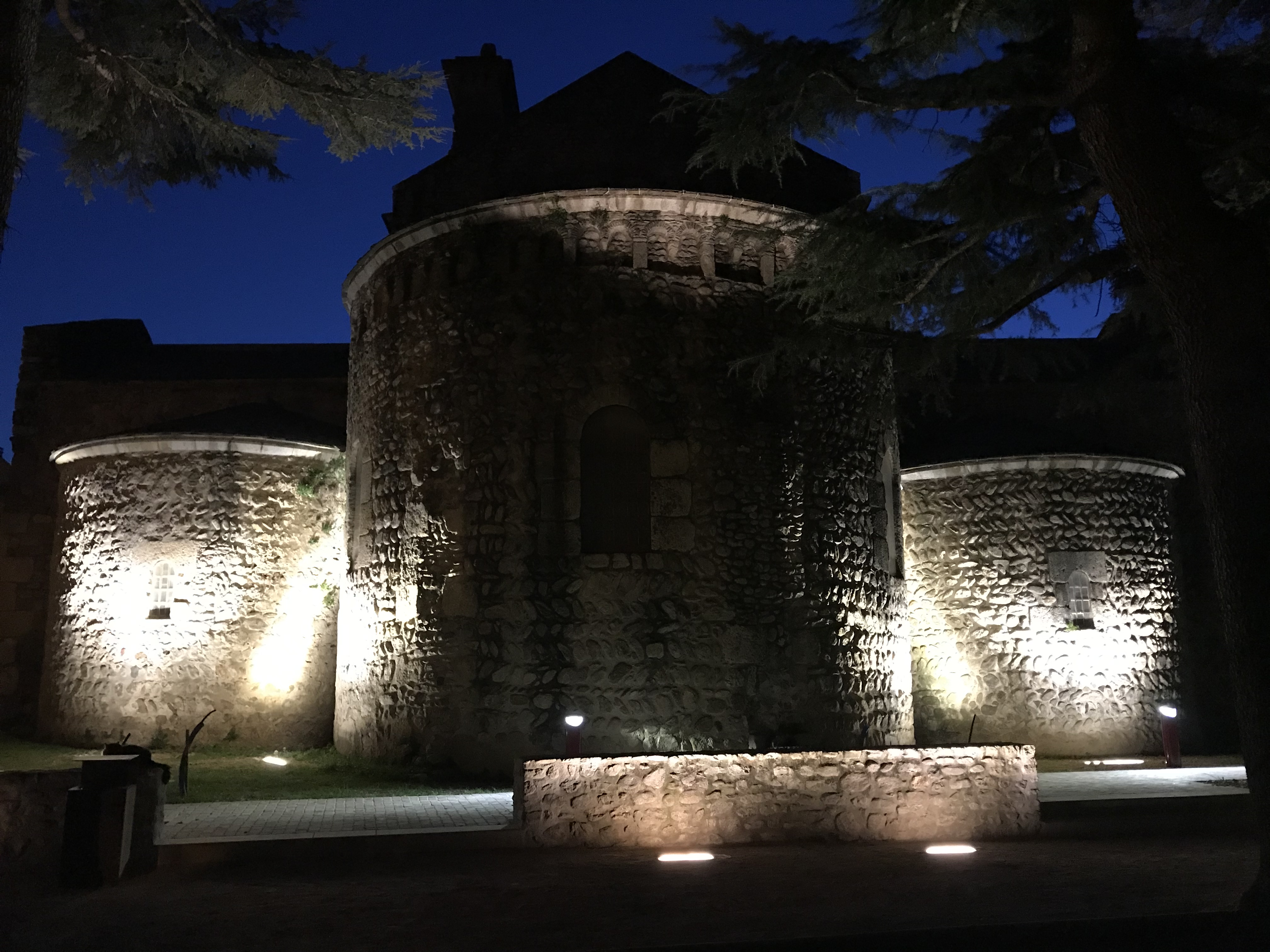 EGLISE DE NUIT